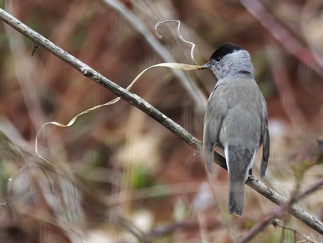 Sylvia atricapilla (Blackcap) ♂